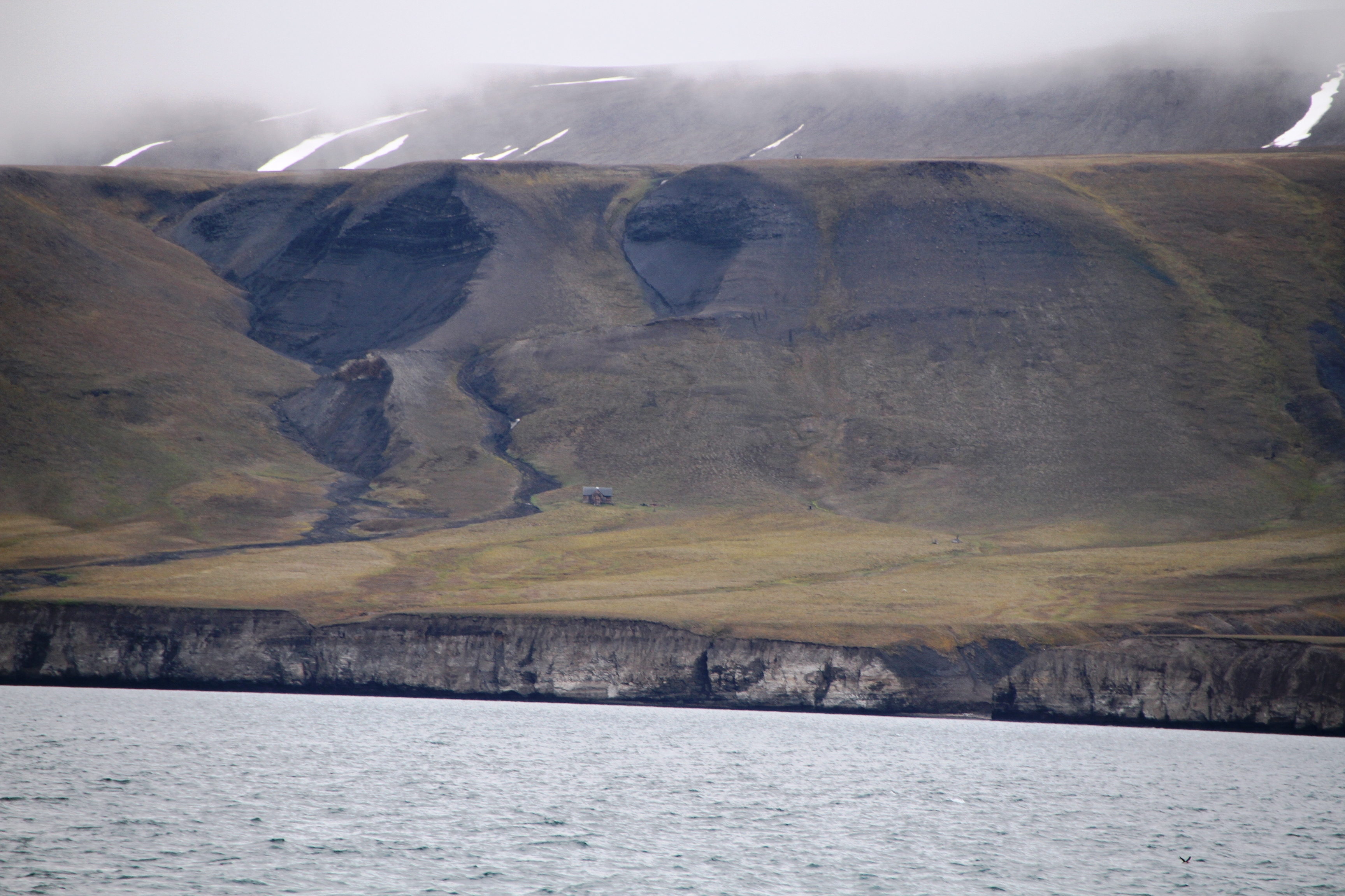 "Svenskhuset", the swedish old mining headquarters where norwegian hunters got poisoned to death in the late 1800s. Billefjorden entrance. Near Cape Thordsen, Svalbard